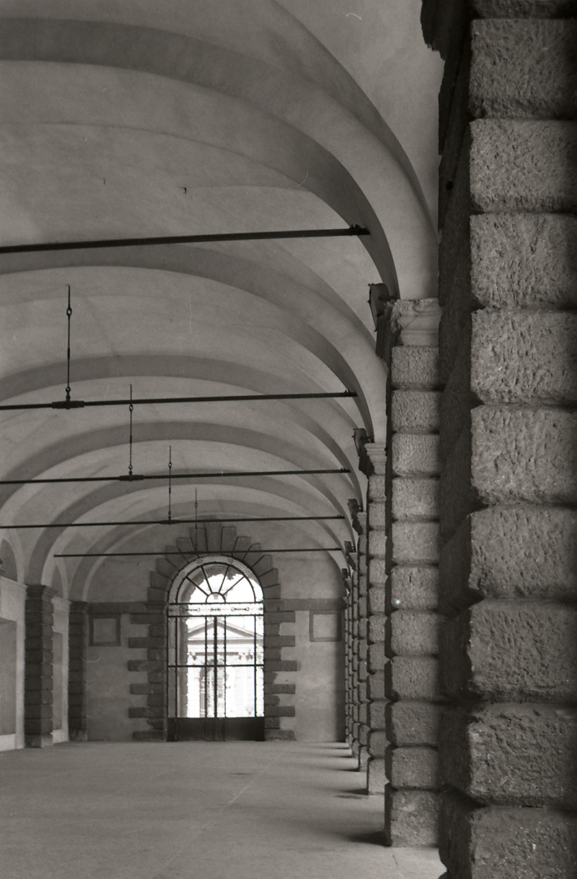 Servizio fotografico : Verona, 1972 / Paolo Monti. - Strisce: 7, Fotogrammi complessivi: 34 : Negativo b/n, gelatina bromuro d'argento/ pellicola ; 35 mm. - ((Sul portanegativi: NIKMAT FP4. - N.B. Possibile sottoserie (2):. - 1-9 = Museo: sculture;. - 11-37 = architetture. - Occasione: Documentazione per la pubblicazione: Brugnoli Pier Paolo, "Nella bella Verona", Bologna, Cappelli, 1972. - Fonte: Agenda di Paolo Monti: Leica 1501-3000 Controllo numerazione (1950-1978), presso Archivio Paolo Monti. - Fonte: Monografia di Brugnoli, Pier Paolo: Nella bella Verona, Bologna, Cappelli (1972). - Fonte: Fattura di Paolo Monti: IV. Commesse/ Fattura/ Fotografie per illustrazione del volume Verona (1972/12/20), presso Archivio Paolo Monti. N. 292 riprese fotografiche della città di Verona in formato 24x30